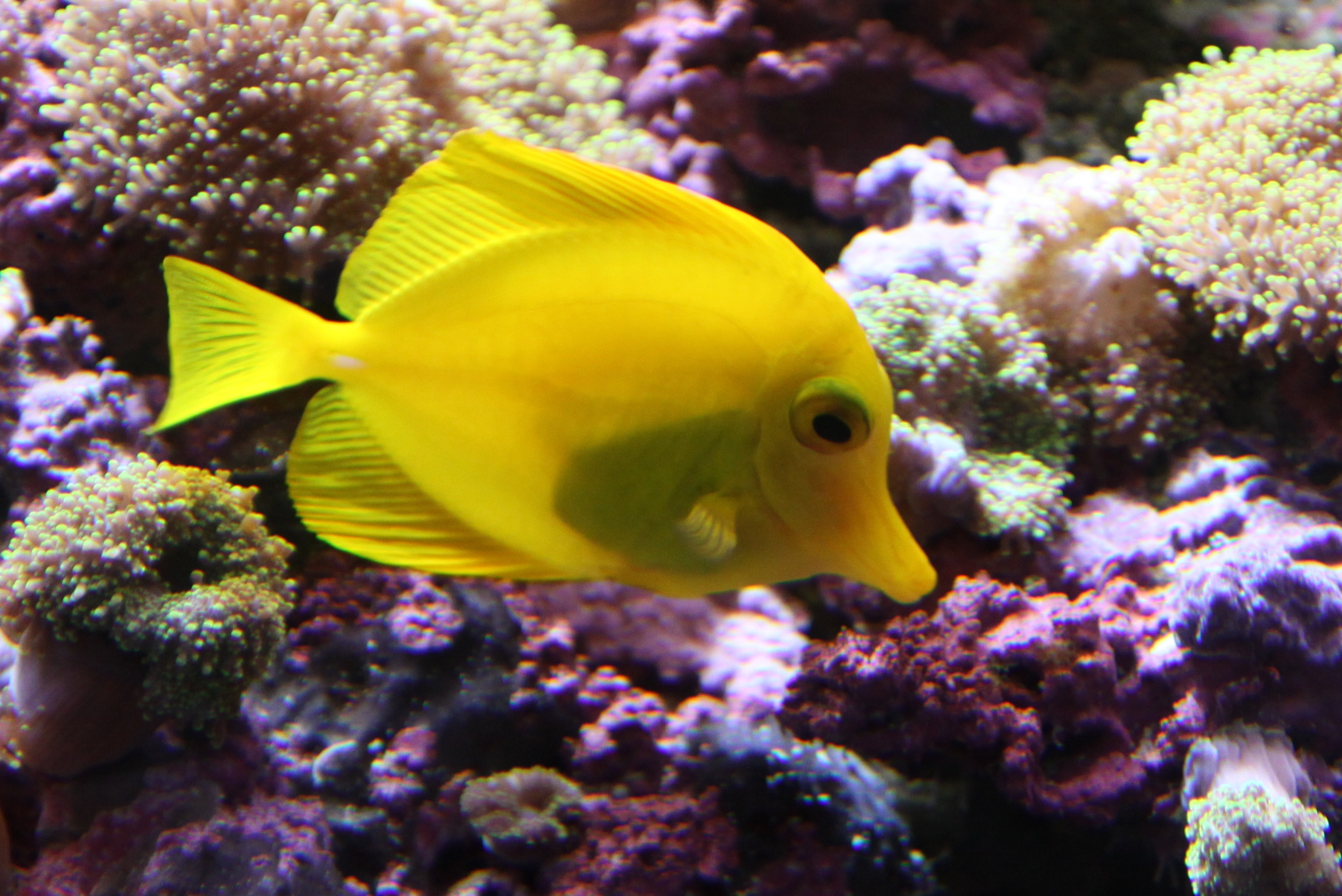 Un chirurgien jaune à l'aquarium tropical de la porte dorée à Paris.